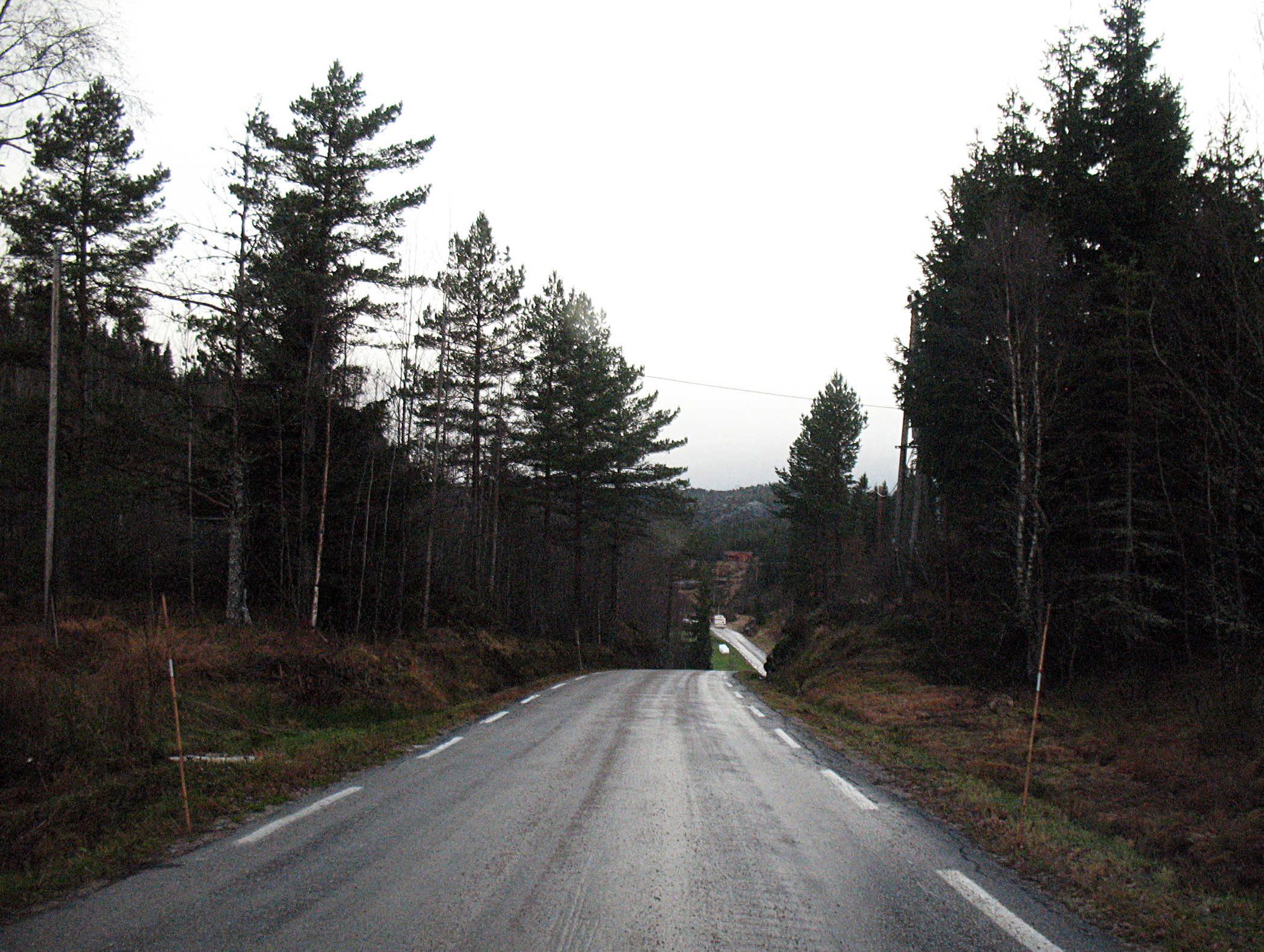 Fylkesvei 57 i Vennesla kommune, Vest-Agder ved Løyning.